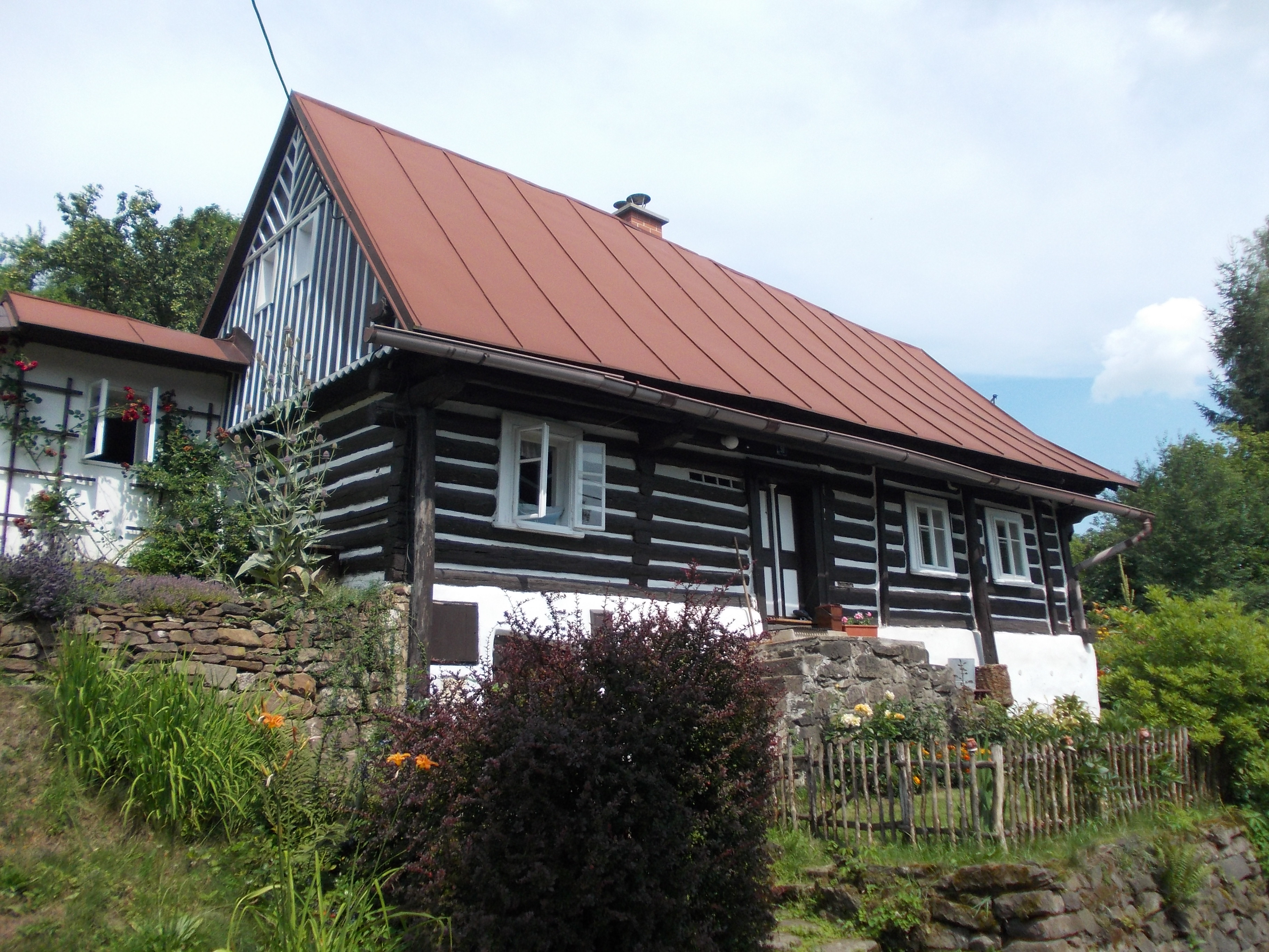 Rybnice - dům č.p. 50